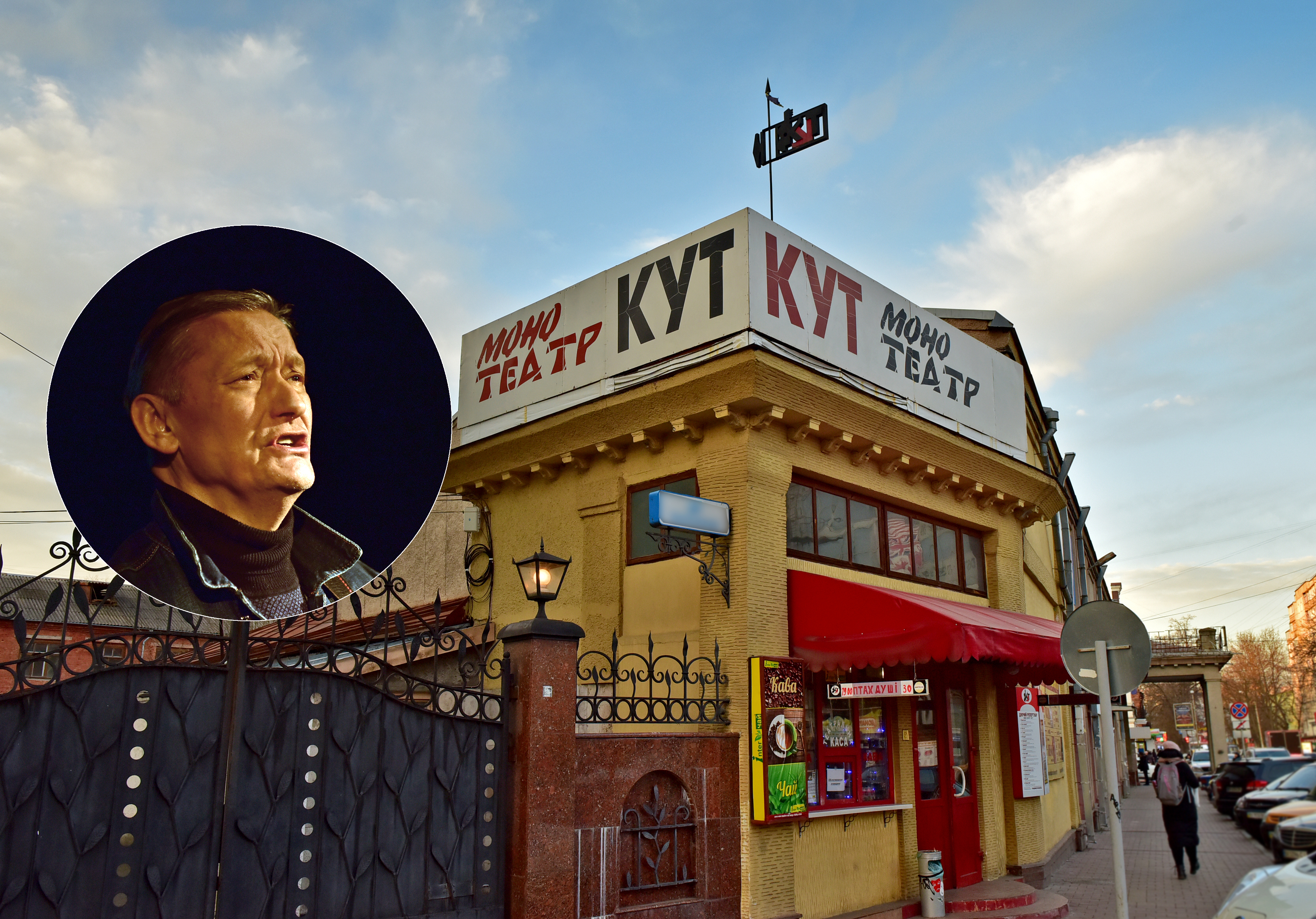 Моно-театр «Кут». Хмельницький. Актор – Володимир Смотритель